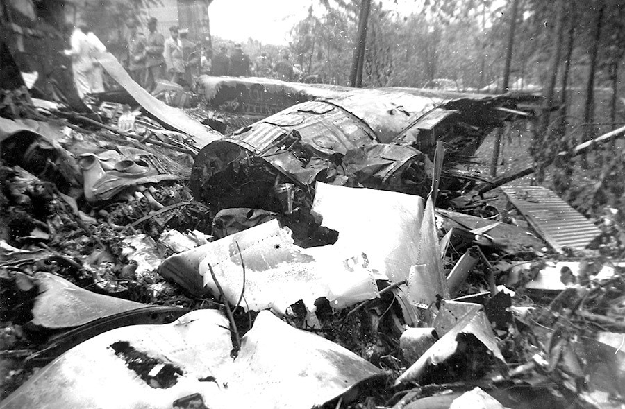 Resti della fusoliera del volo TWA n° 891 precipitato a Olgiate Olona il 26 giugno 1959.